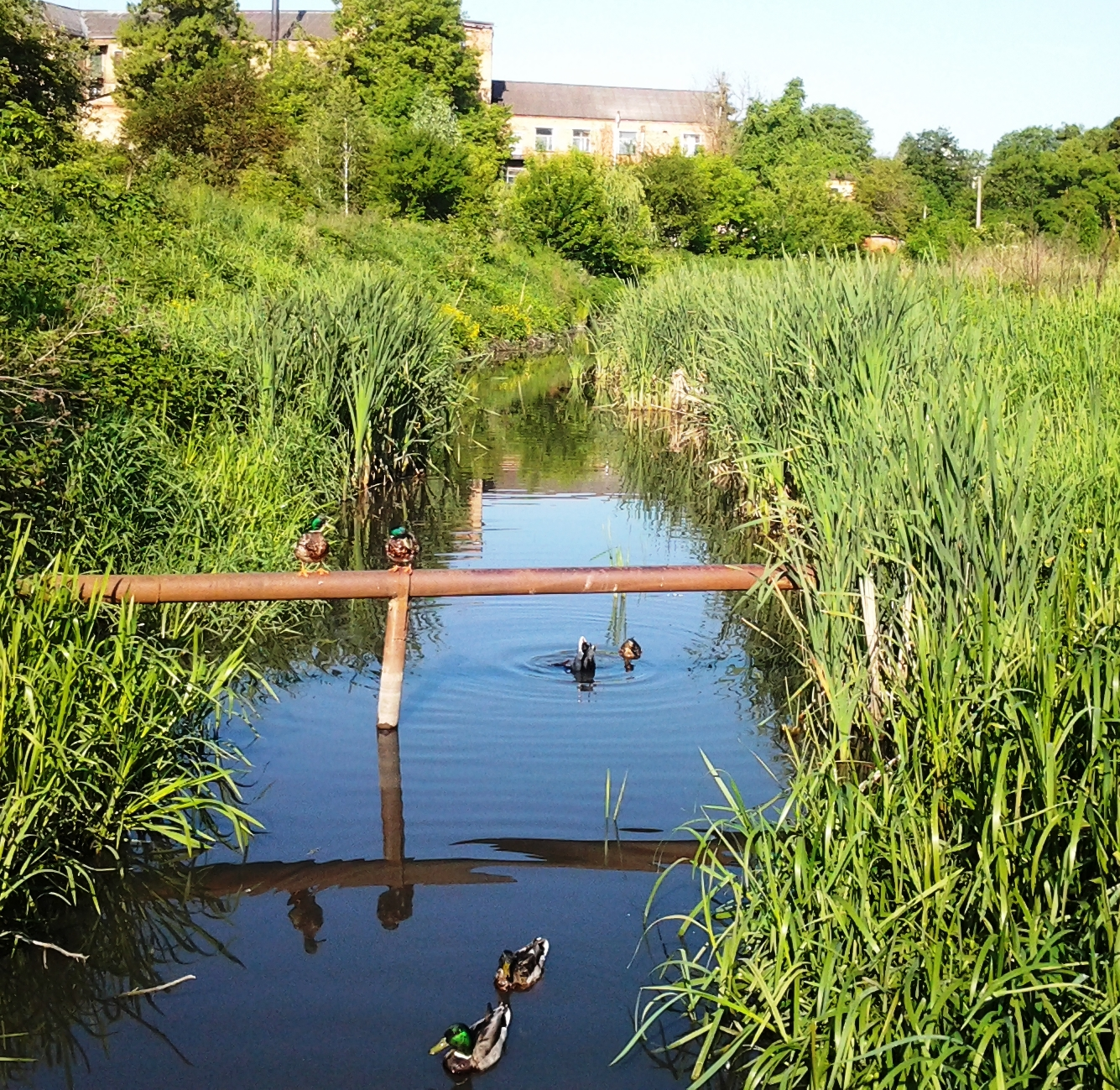 Річка Сапалаївка (права притока р. Стир) в центральній частині м. Луцька, Волинська область, Україна, 2016 рік.